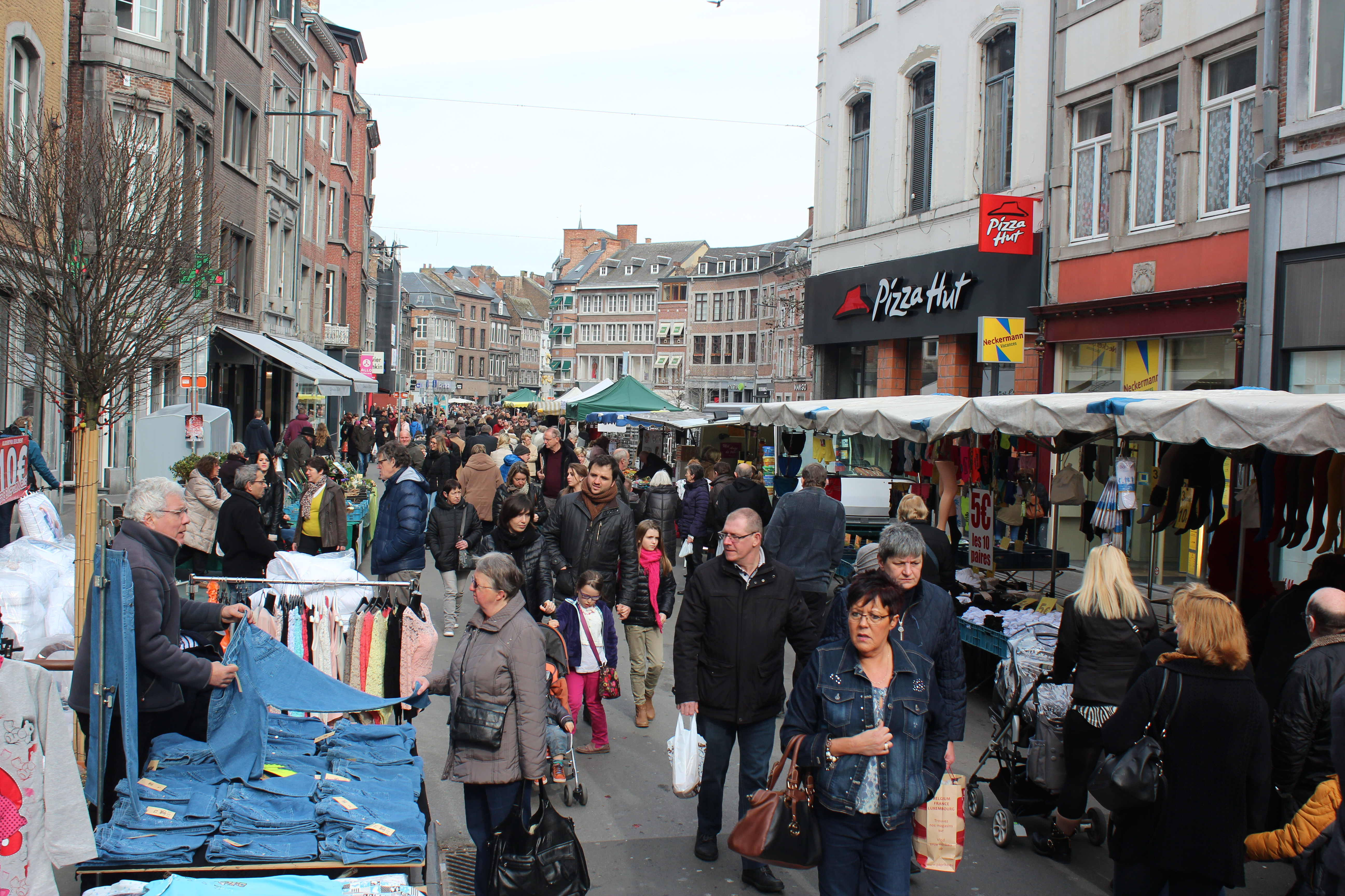 marché Namur samedi